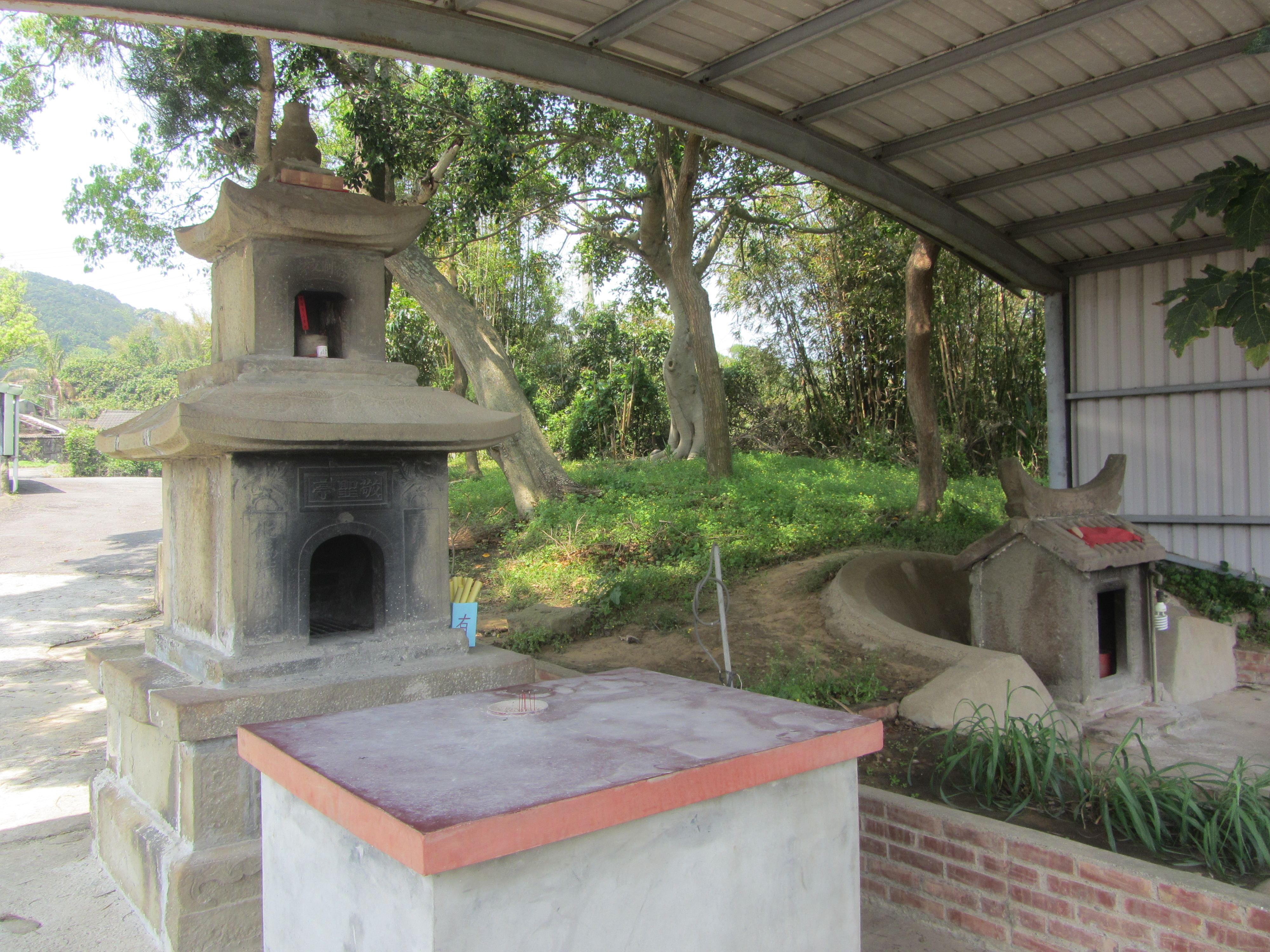 苗栗縣歷史建築西湖敬聖亭（左）及福德祠（右）